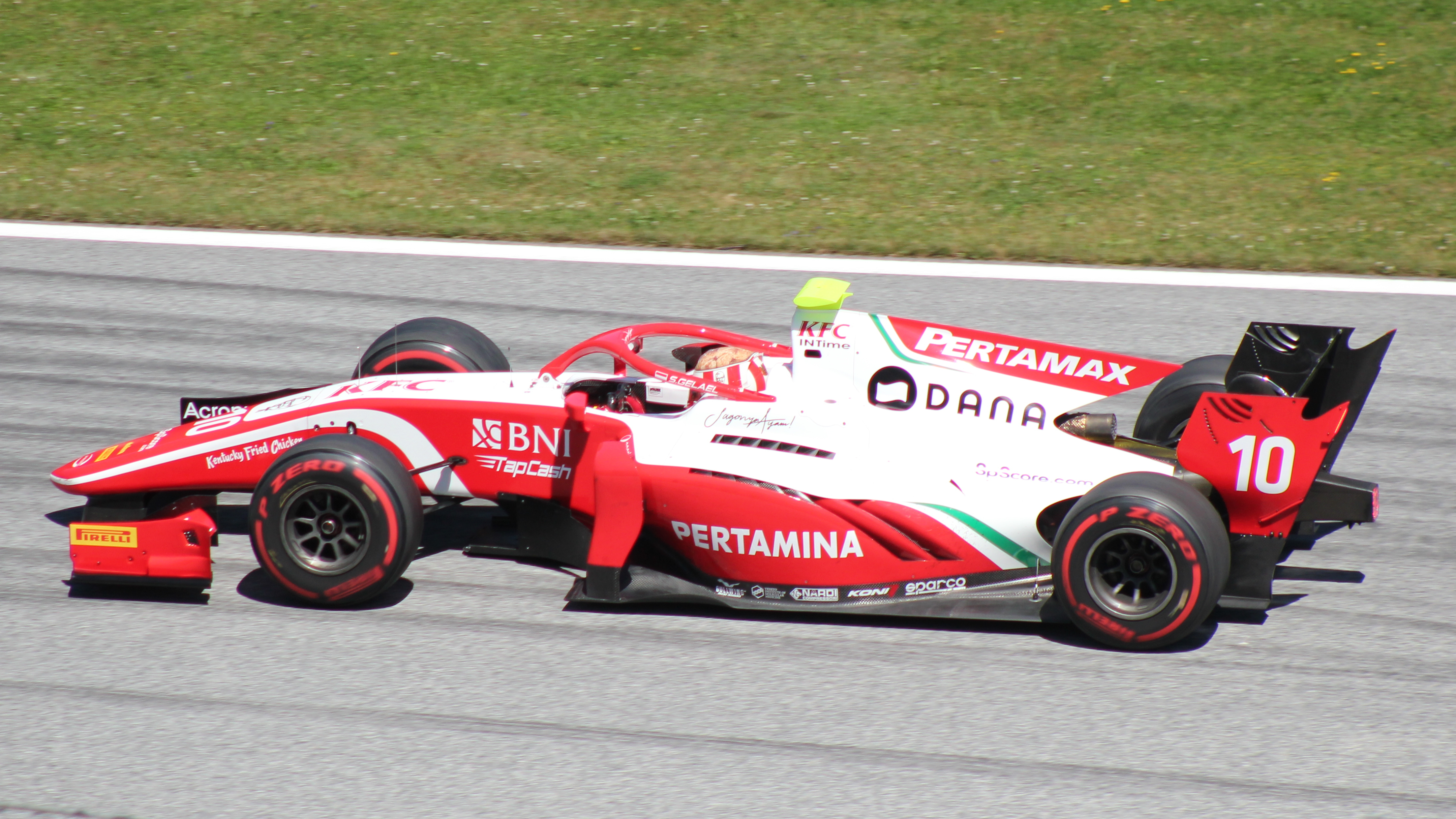 Gelael beim Rennwochenende in Österreich 2019